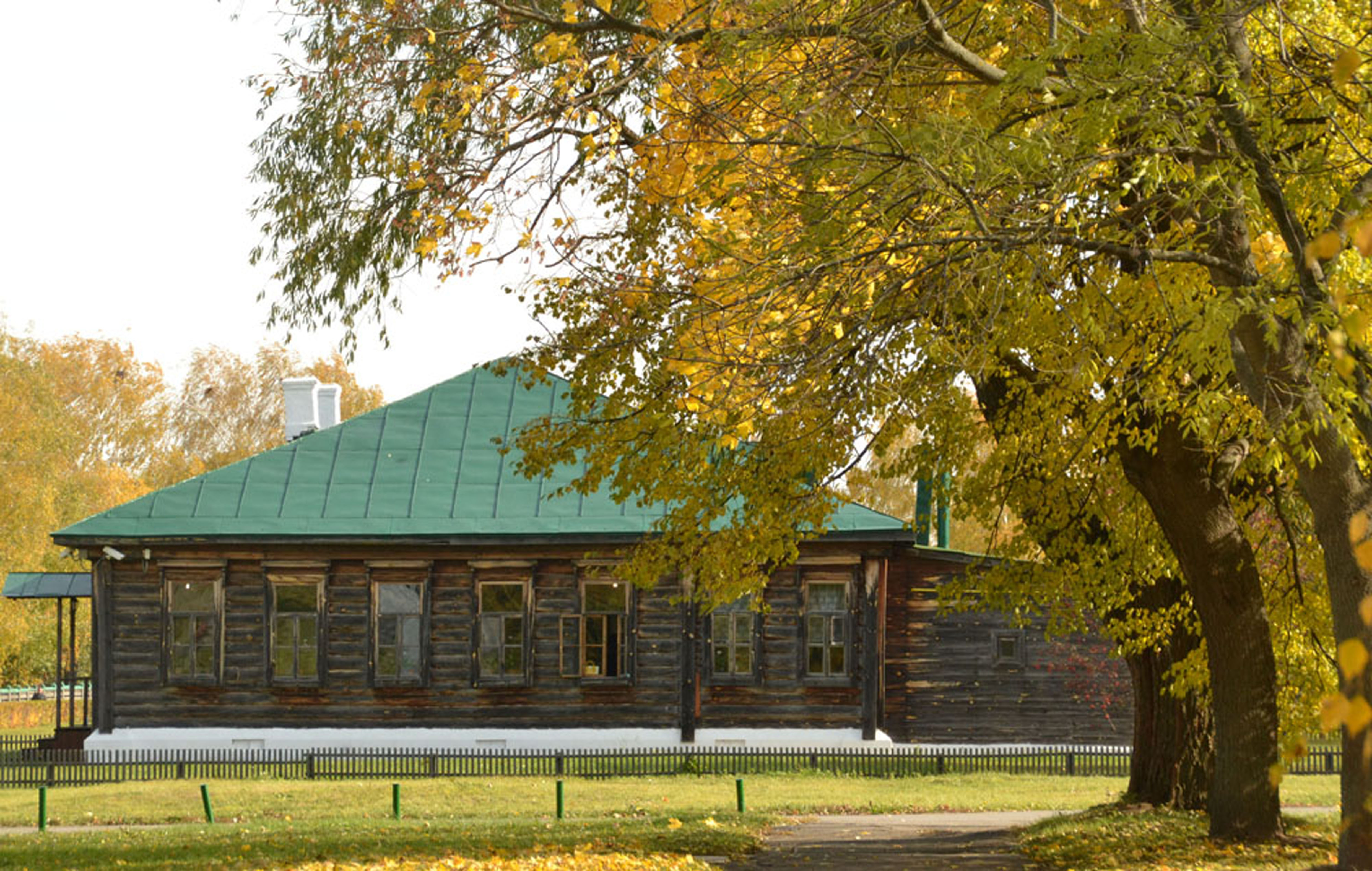 Земская школа Государственный музей-заповедник С.А. Есенина